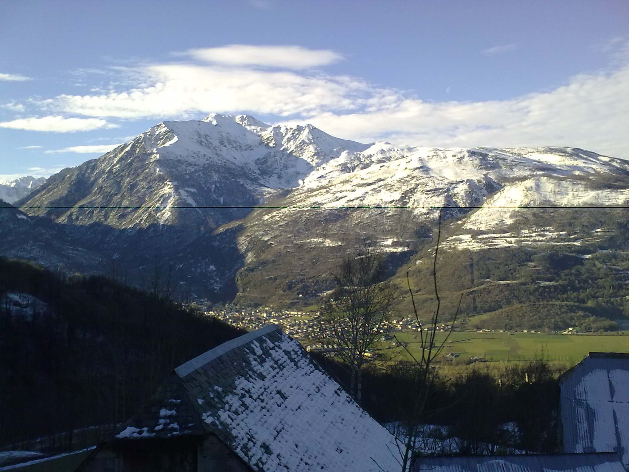 Vue sur la montagne depuis Artalens.